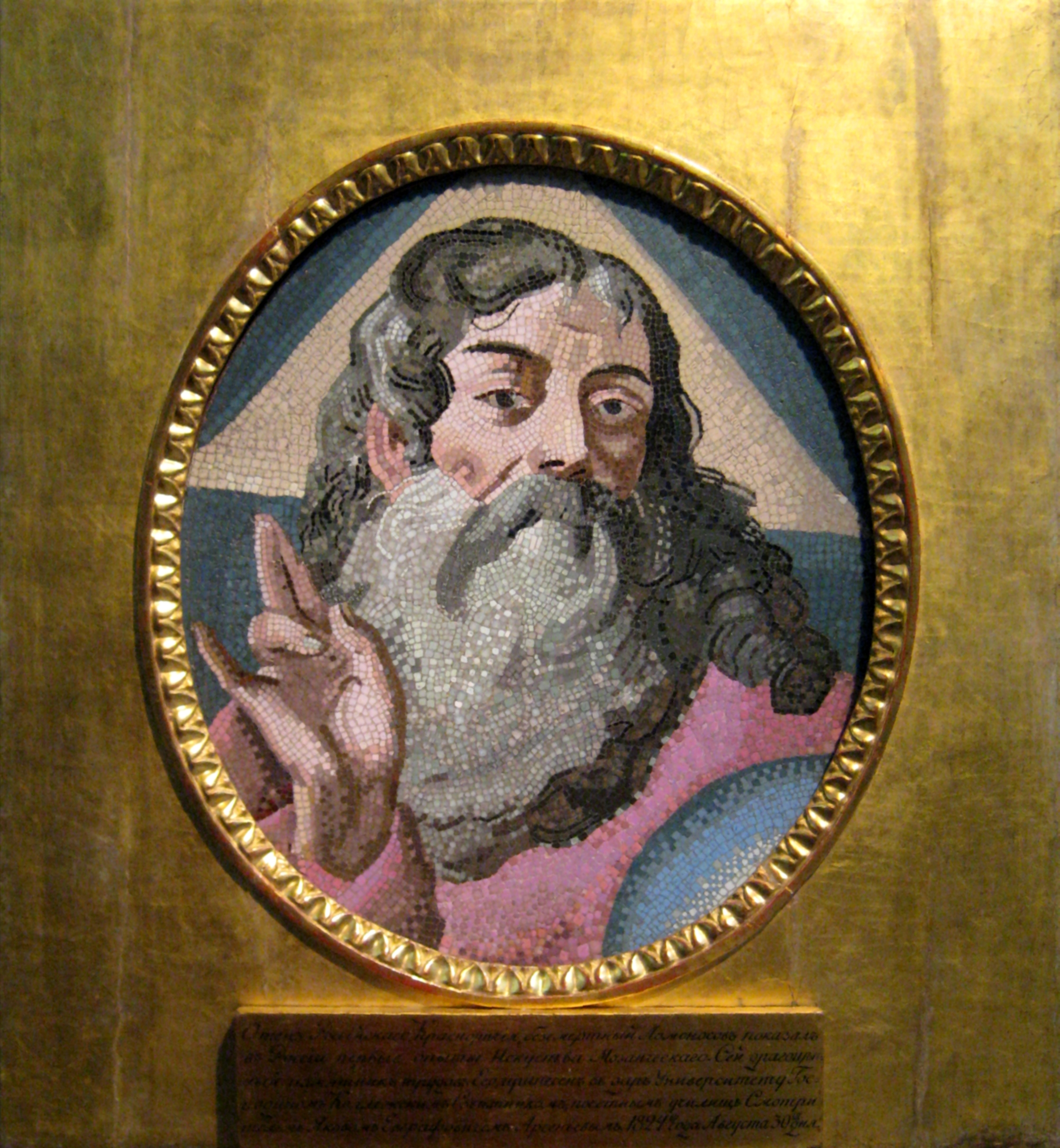 Мастерская М.В. Ломоносова. Бог Отец (Саваоф). 1756-1757. Мозаика, смальта. ГИМ. Композиция мозаики представляет свободную переработку композиции гравюры М.А. Питтери по оригиналу Д. Пьяцетты. Относится к ранним работам старших учеников мозаичного набора мастерской М.В. Ломоносова - Матвея Васильева и Ефима Мельникова, взятых возглавлявшегося И.Э. Гриммелем. Цветная смальта, бронза, смола; рама – золоченое дерево. 38,3 x 33,2. Реставрация: О. В Яхонт. 1990 г.